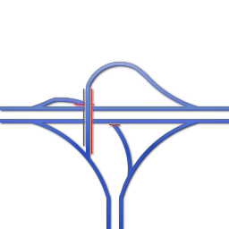 Een schema van een half sterturbineknooppunt, gemaakt door mezelf.